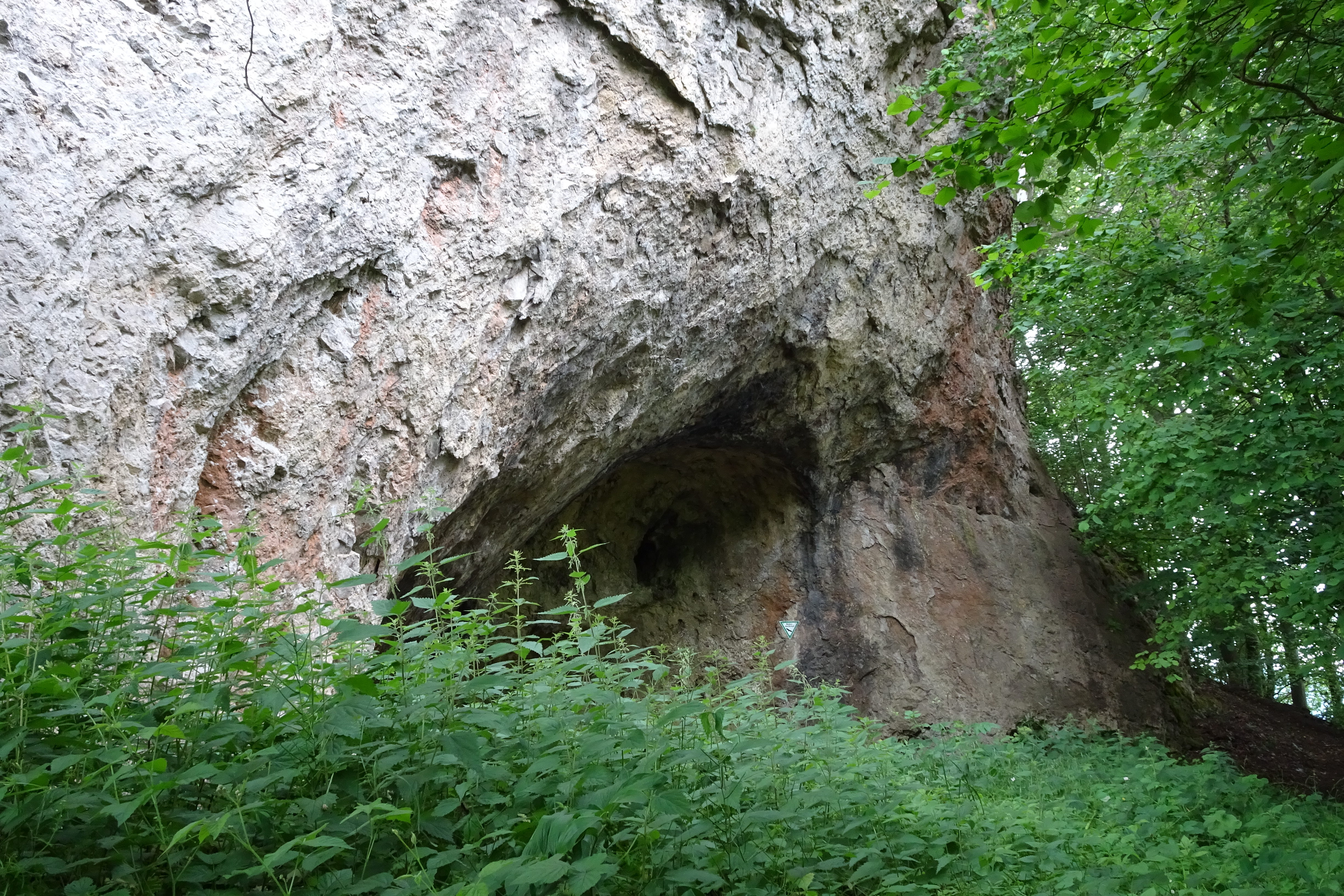 Der Mühlstein bei Wolfterode ist ein Felsen der aus dem Dolomit des oberen Zechsteins besteht. Er reiht sich ein in eine Anzahl alleinstehender Felsformationen, die aus dem Karstgebiet des östlichen Meißnervorlands ragen und die die Landschaft prägen. Wegen seiner besonderen geologischen und vegetationskundlichen Bedeutung wurde er bereits im Jahr 1936 als Naturdenkmal ausgewiesen. Der Mühlstein liegt östlich von Wolfterode, einem Ortsteil der Gemeinde Meißner im nordhessischen Werra-Meißner-Kreis.